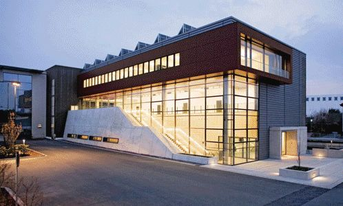 Schüco Technology Center Bielefeld